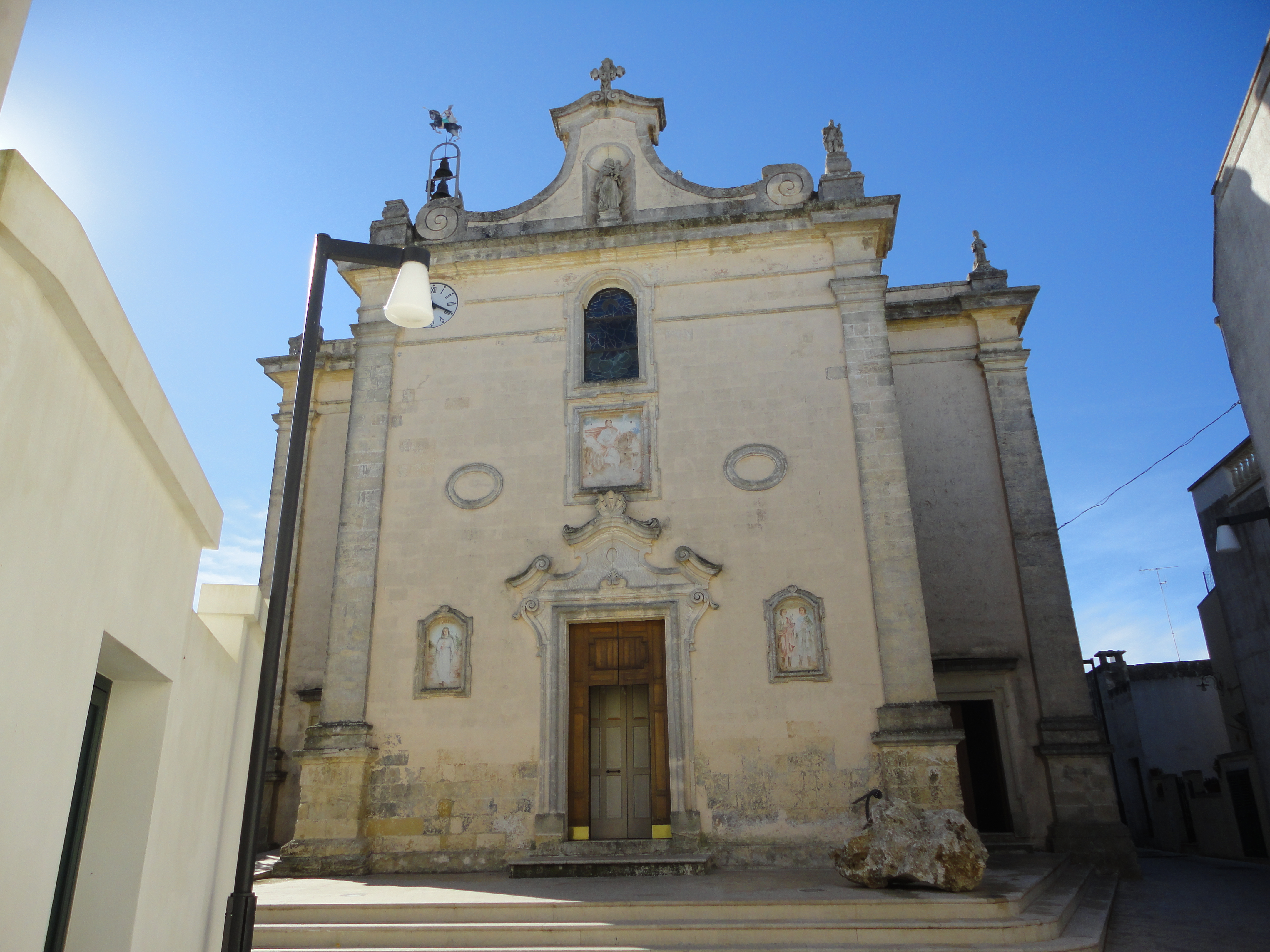 Chiesa di San Vitale Marittima, Lecce